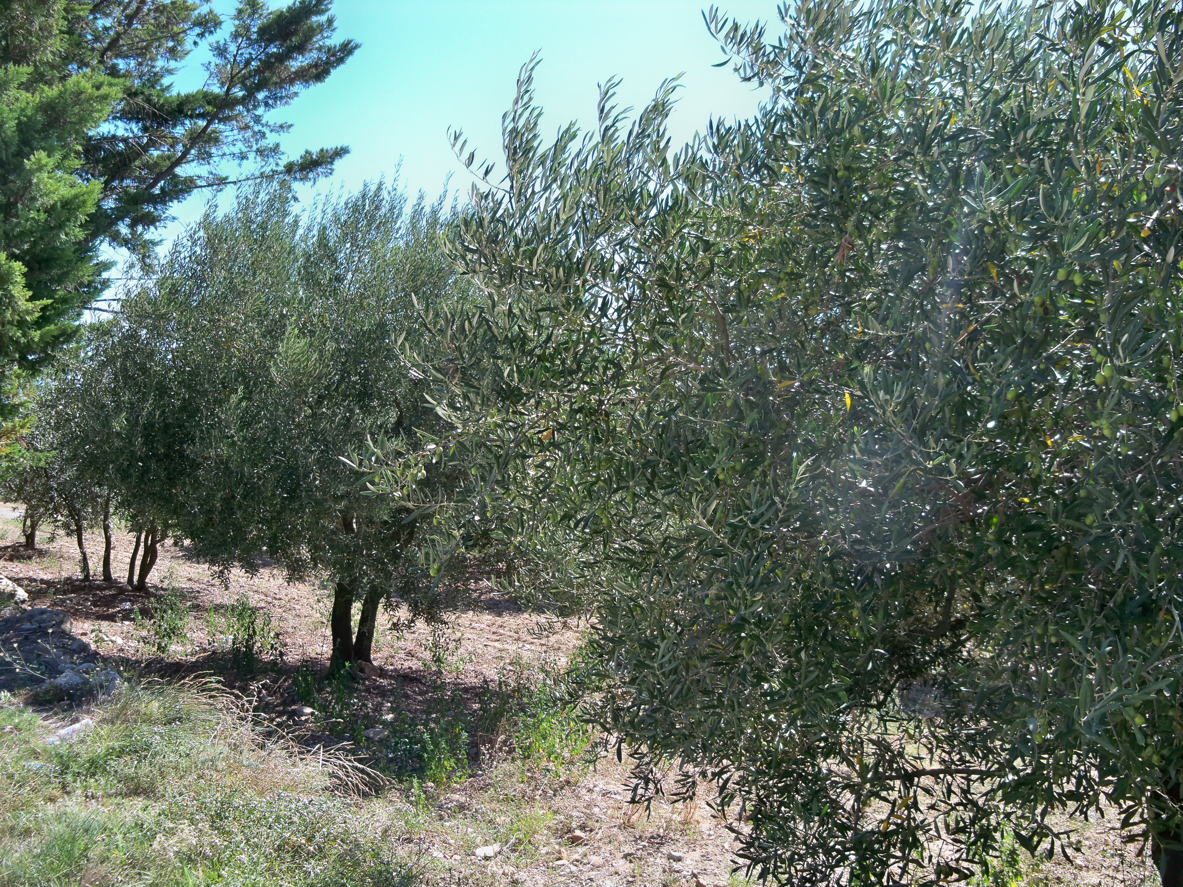 Oliviers dans le gard